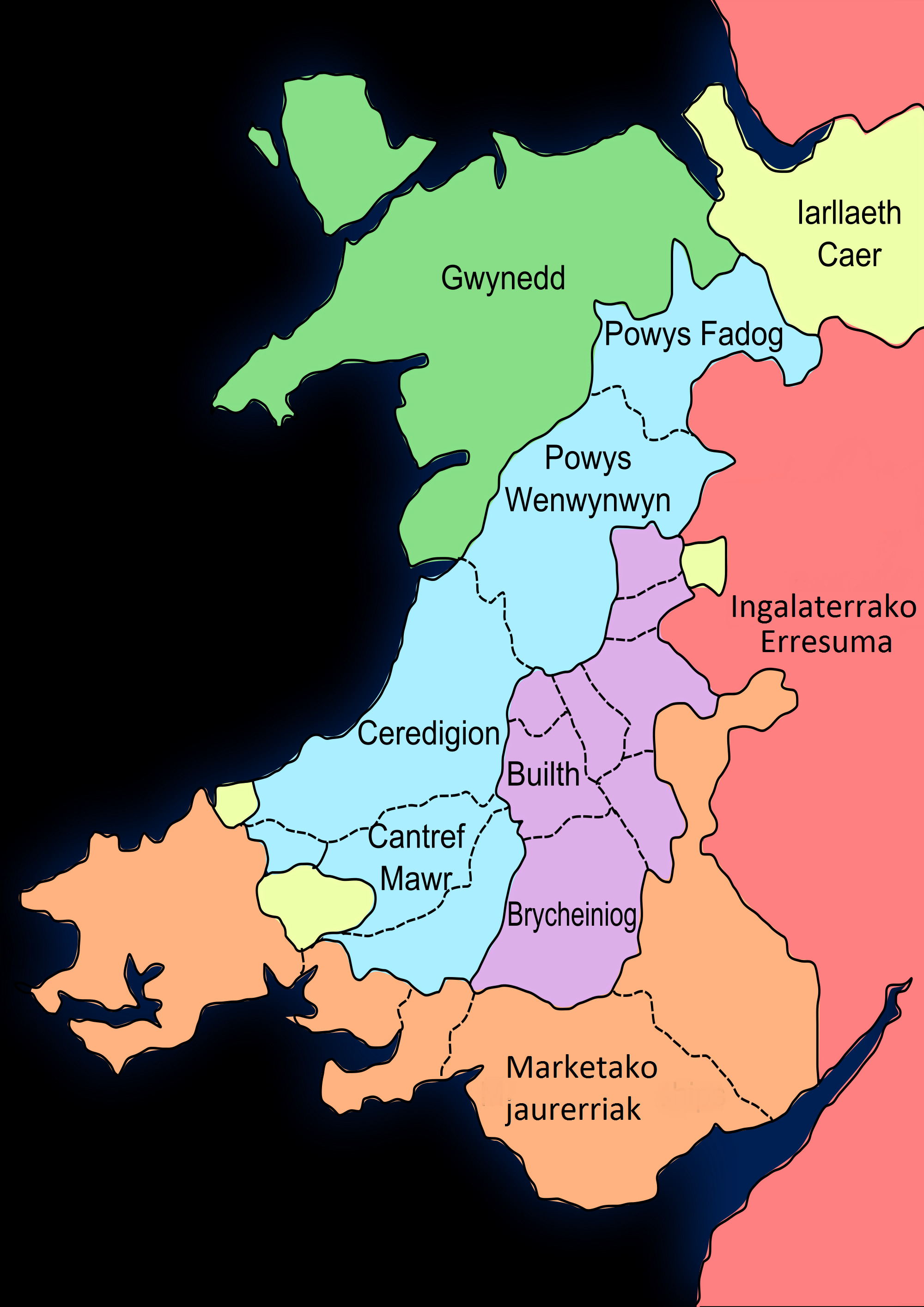 Gales 1267ko Montgomeryko Itunaren ondoren